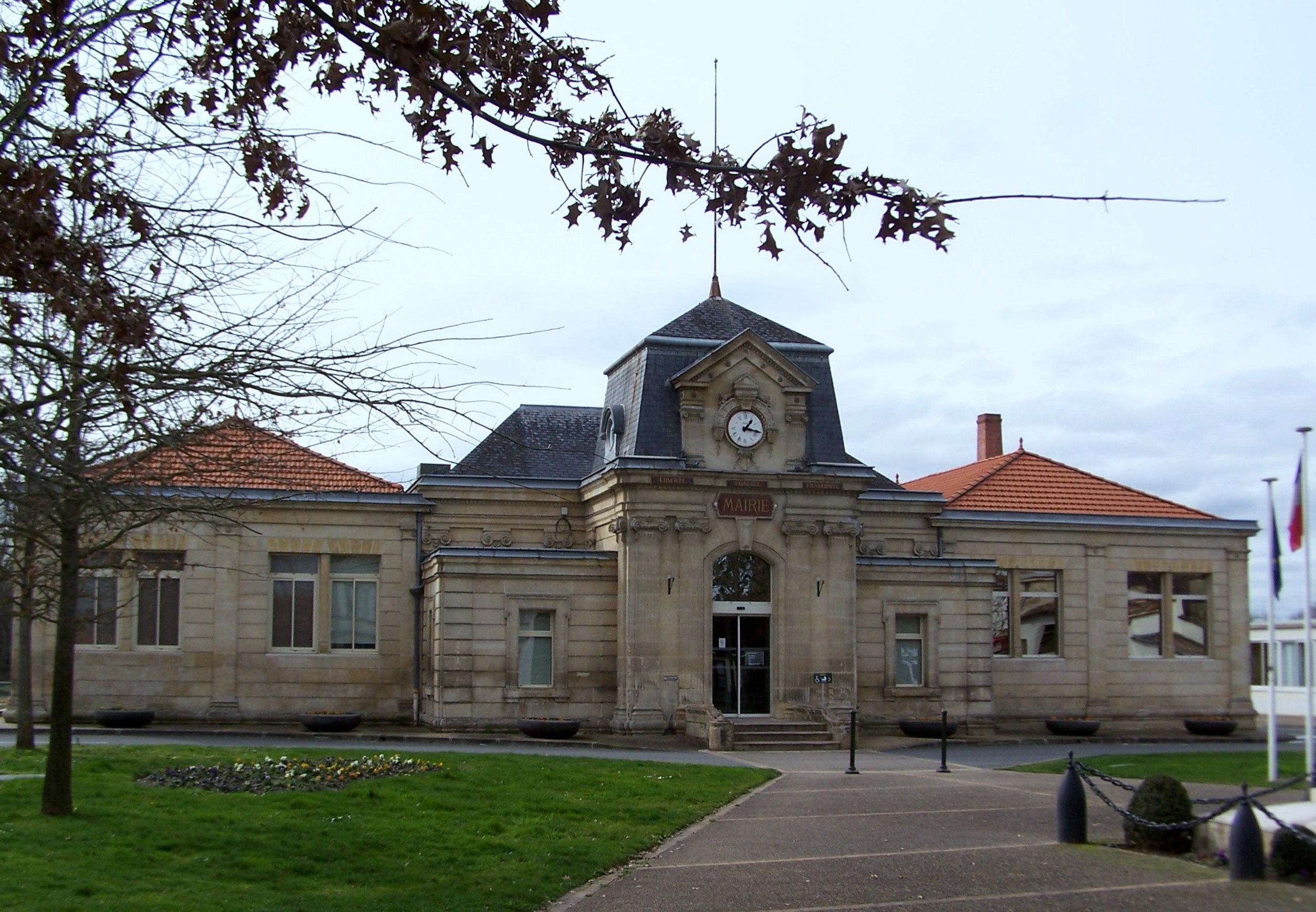 Mairie de Ambarès-et-Lagrave (Gironde, France)